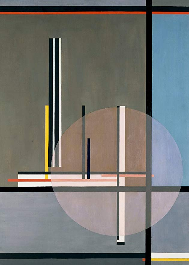 Gemälde von László Moholy-Nagy aus dem Jahr 1922, Kunsthaus Zürich